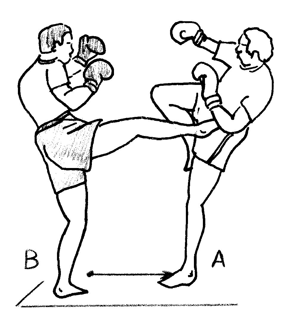 contre_front1.jpg